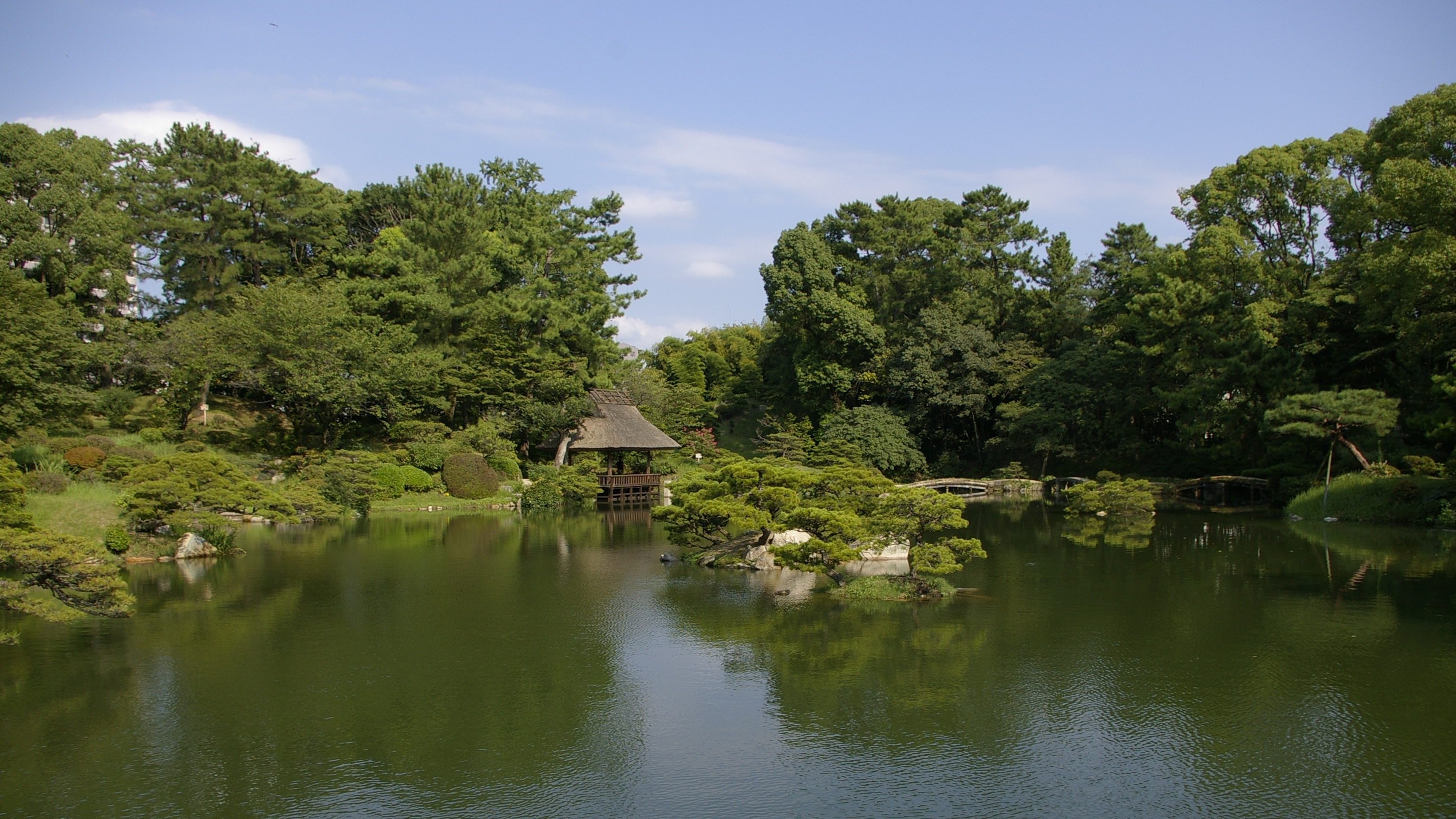 Shukkei-en; Blick nach Osten über den Teich